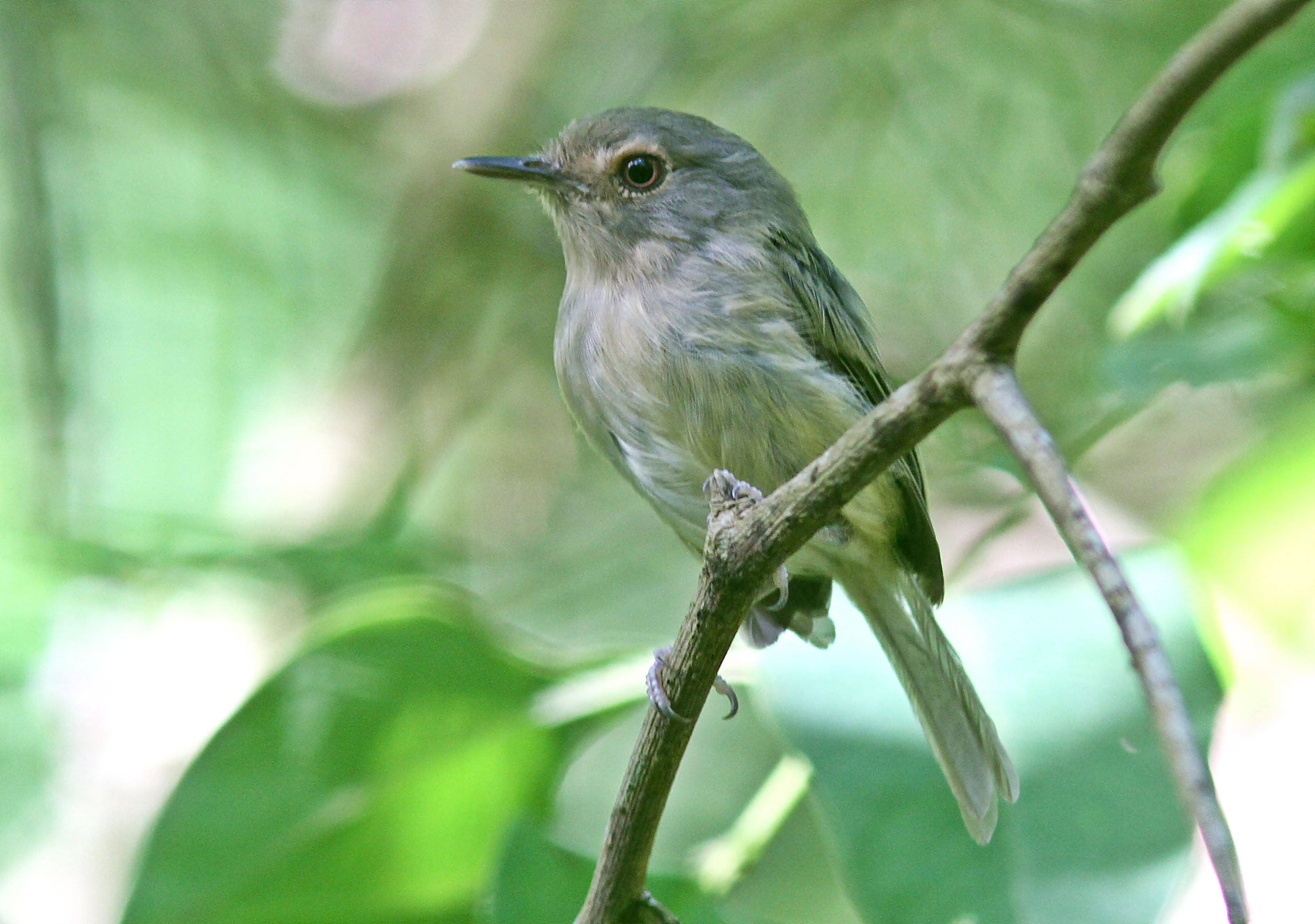 Maria do nordeste